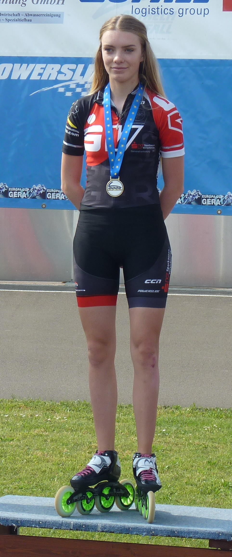 Angelina Otto bei den 26. Internationalen Geraer Rollsporttagen, Gera, 29. Mai 2016.